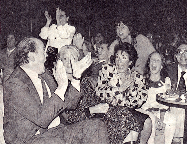 Los cercanos a Cecilia Bolocco celebran su triunfo en el Anfiteatro Lo Castillo en 1987. A la izquierda se encuentra su padre, Enzo, y la niña sentada al lado de la mesa en su hermana Diana.